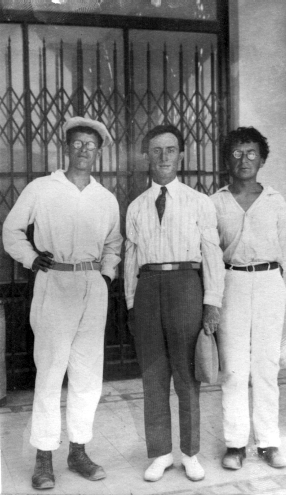 הסיעה המכסימליסטית ב-א"י. משמאל לימין: אב"א אחימאיר, אורי צבי גרינברג, יהושע ייבין, 25/06/1927